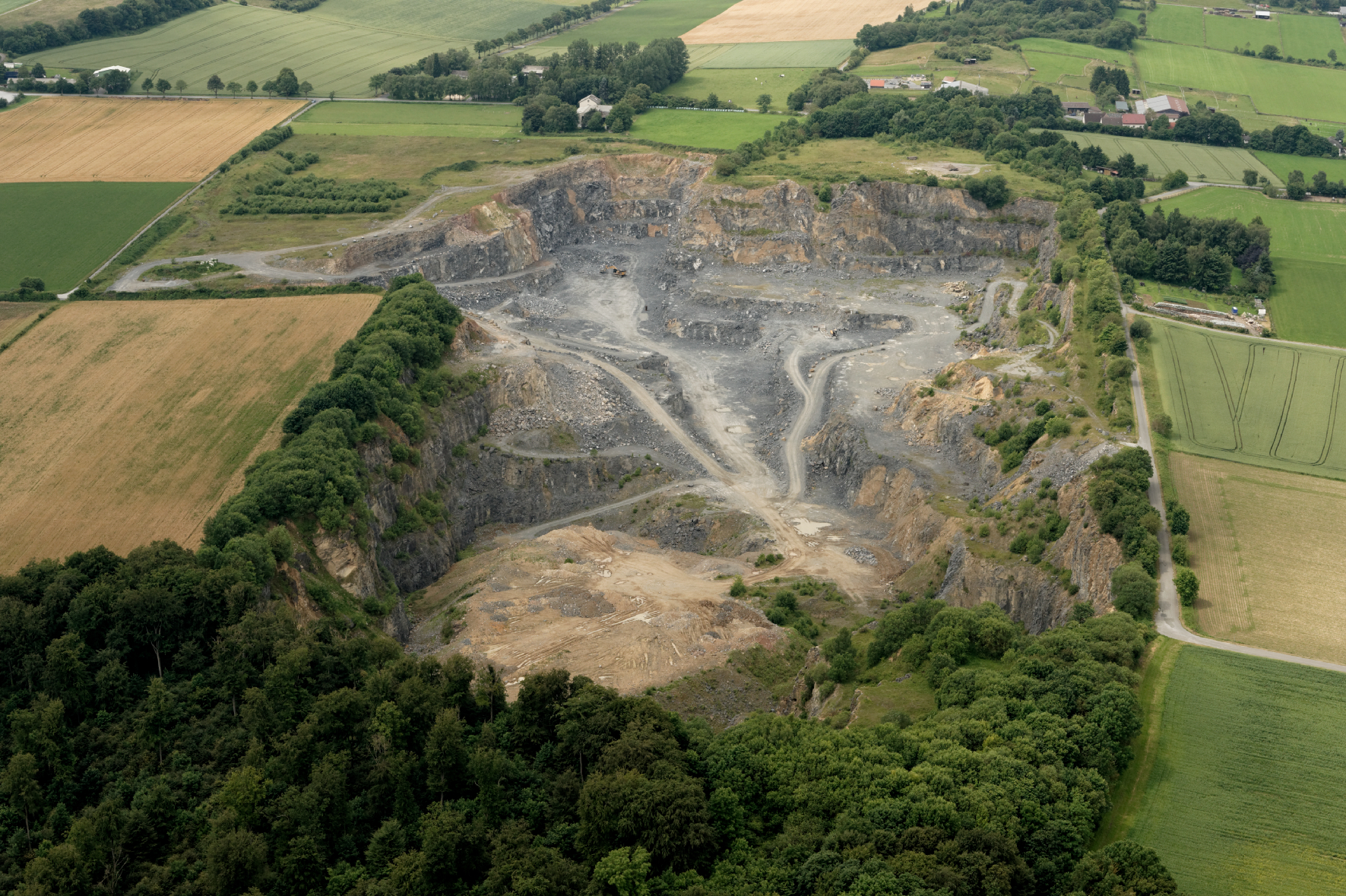 Fotoflug Sauerland Nord. Steinbruch in der Flur Auf dem Stein südlich von Warstein-Suttrop, unten Naturschutzgebiet Lörmecketal (Kreis Soest), Blickrichtung West The making of this document was supported by the Community-Budget of Wikimedia Germany.